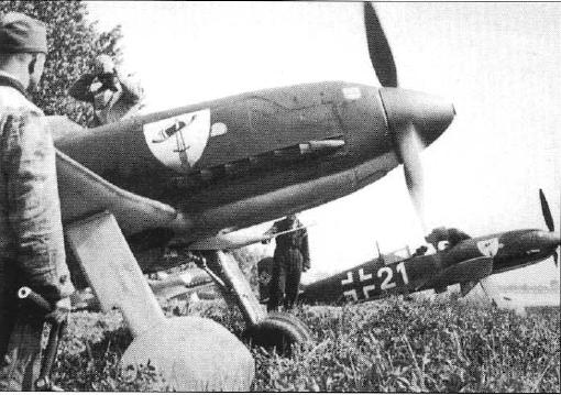 Не 100 из несуществующей эскадрильи, весна 1940 года